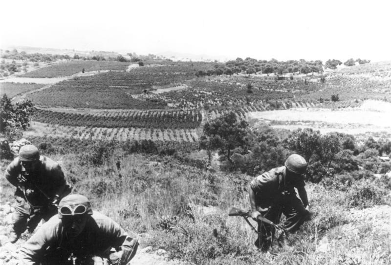 ADN-ZB/Archiv II. Weltkrieg 1939-1945 Die griechische Insel Kreta wird durch faschistische deutsche Truppen in erbitterten Kämpfen vom 20. Mai bis 1. Juni 1941 erobert. Vorsichtig geht ein Stoßtrupp deutscher Fallschirmjäger durch Olivenhaine und Weinberge vor. (Aufn.: Weixler)